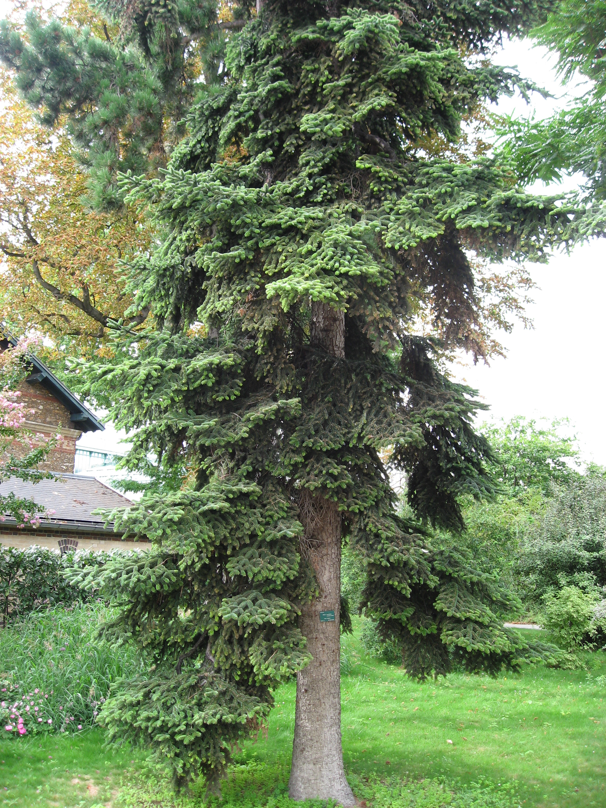 Abies numidica in Serres d'Auteuil Map: 48° 50' 49" N 2° 15' 8" E